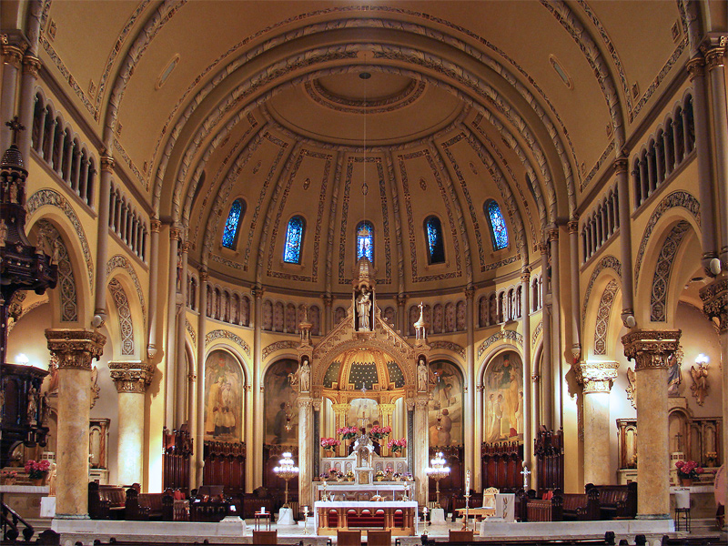 Église Saint-Stanislas-De-Kostka, Montréal, Québec, Canada.